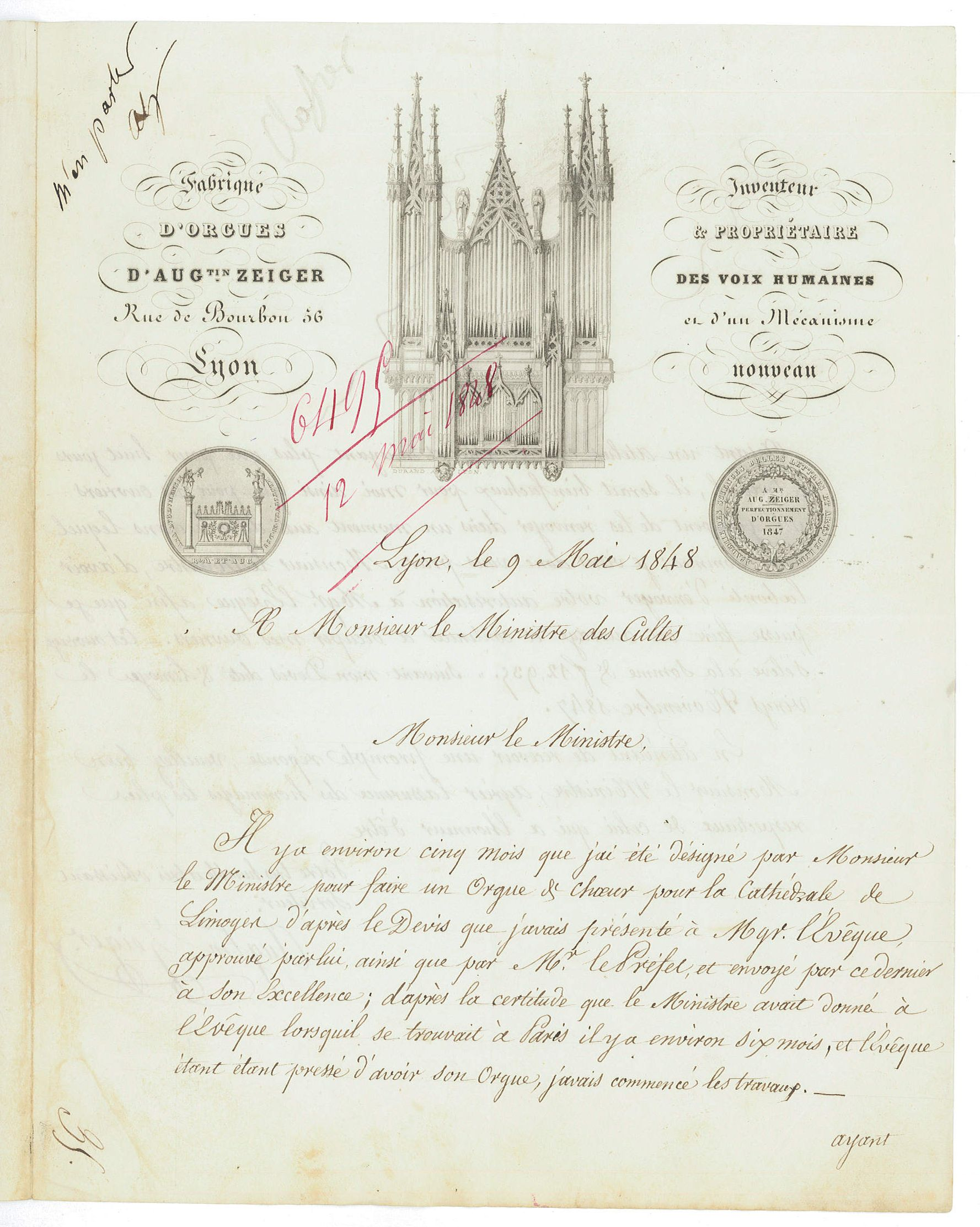 Lettre avec entête du facteur d'orgue Augustin Zeiger (Lyon) pour les travaux de construction de l'orgue d'accompagnement de la cathédrale de Limoges. Source : Archives nationales, cote F/19/7724